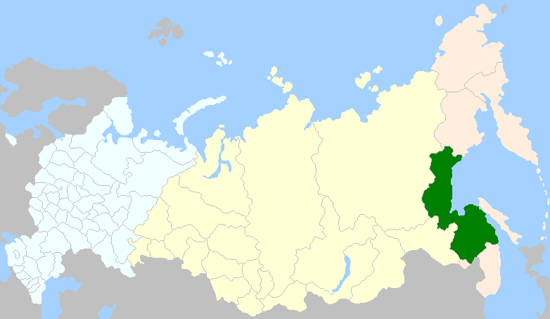 régions administratives occupées en 2008 par les Negidales Orotches Oultches